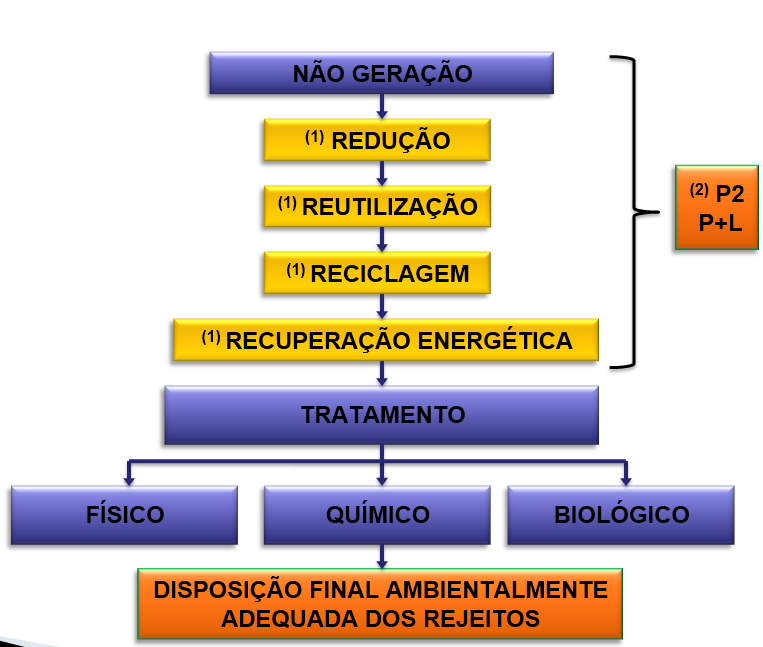 Ordem hierárquica da politica orientada aos resíduos sólidos